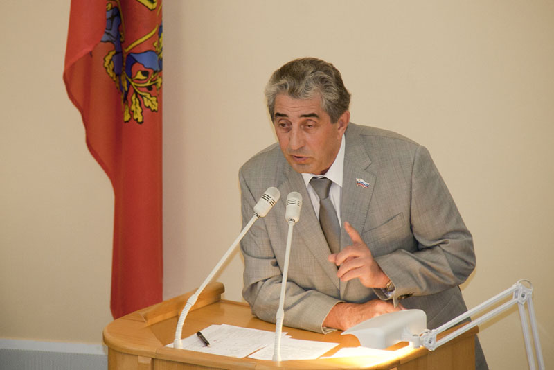 Грачев Сергей Иванович